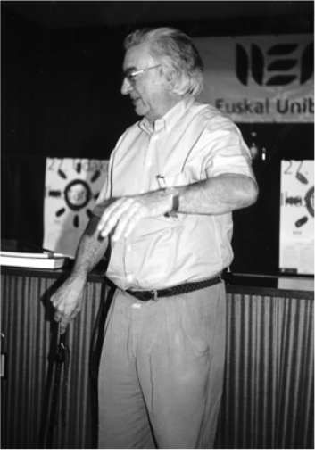 Txillardegi adiskidea, 1999ko uztailaren 19ko ekitaldian UEUk oparitutako euskaldun makila eskuan.